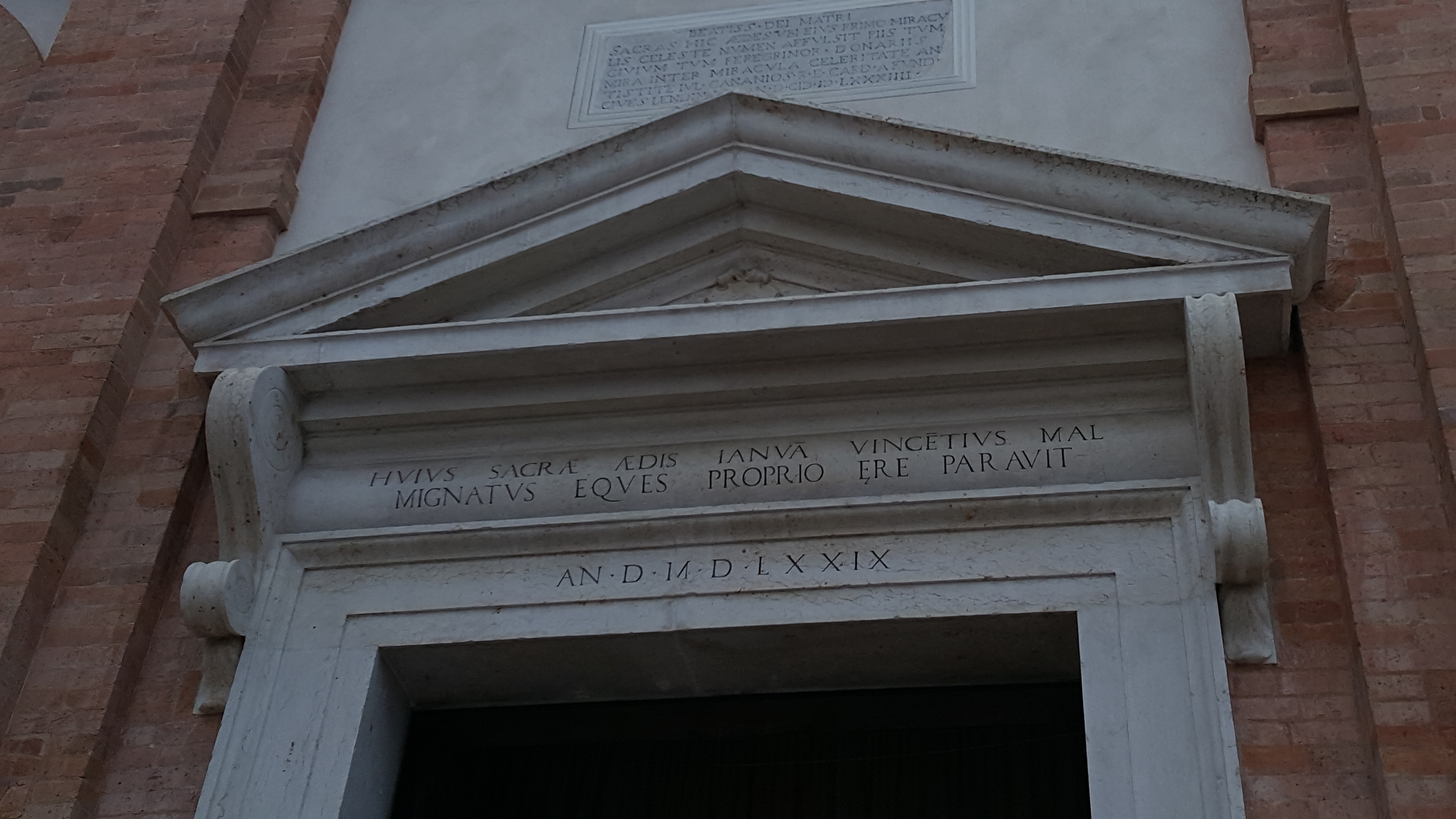 Iscrizione vincenzo malmignati del 1579